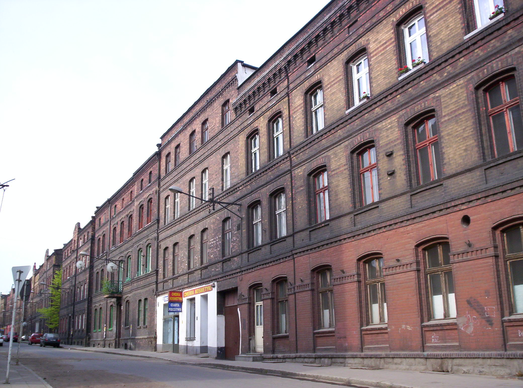 Ul. Janasa w Katowicach